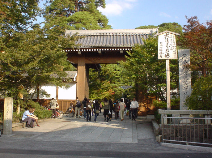 Eikando(Zenrinji) somon